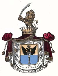 Walewski COA in Russia